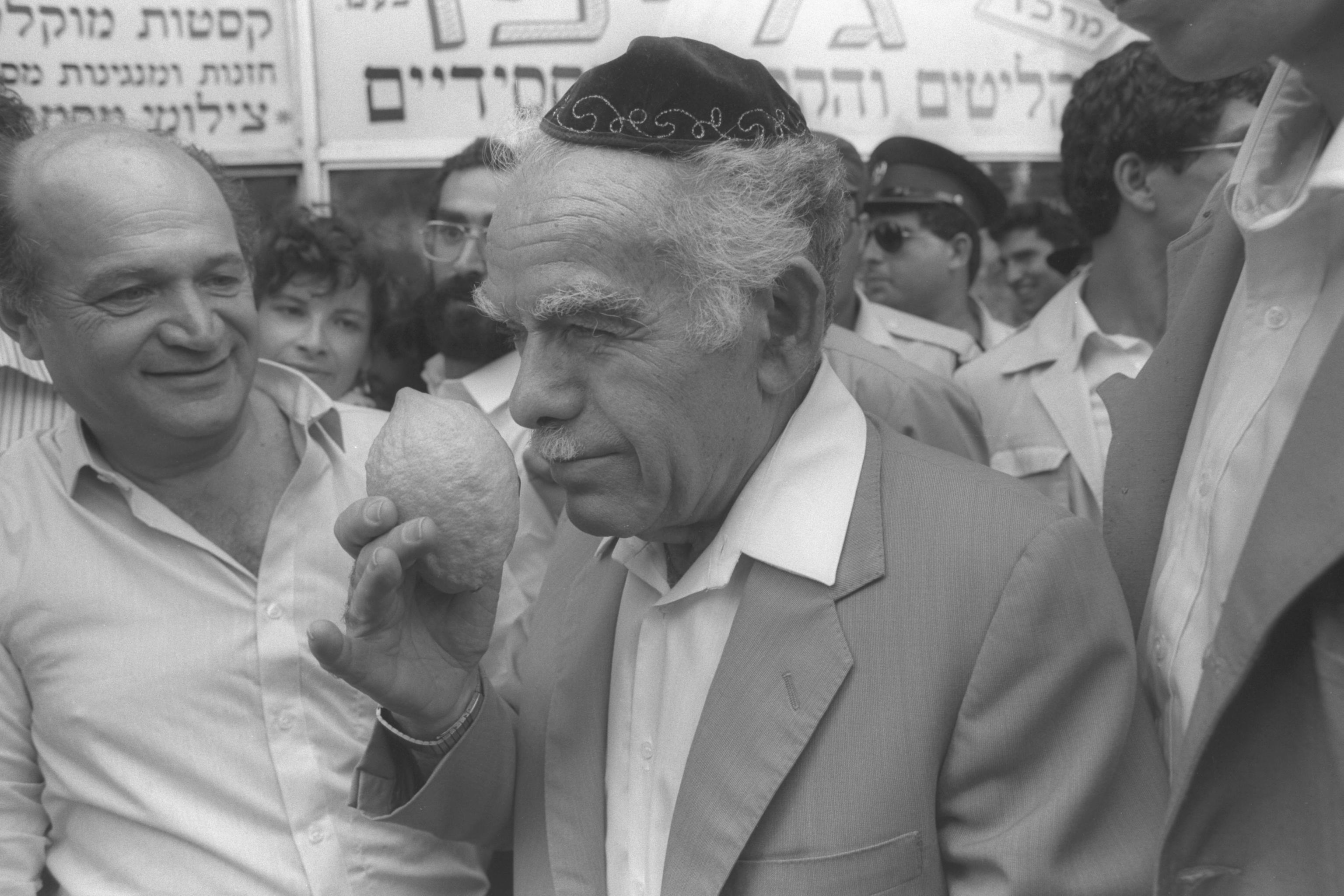 Prime Minister Yitzhak Shamir sniffs an ethrog during his visit to the Sukkot market in the Geula quarter in Jerusalem. Photo by Ayalon Maggi. ראש הממשלה יצחק שמיר מריח אתרוג בסיורו בשוק סוכות; בשכונת גאולה בירושלים.צילום: מגי איילון